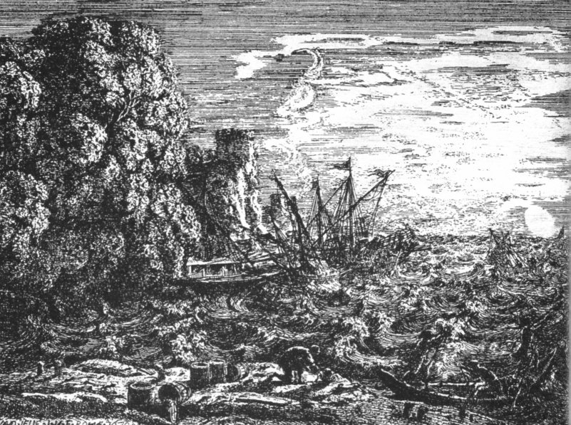 La tempestad, aguafuerte de Claude Lorrain.